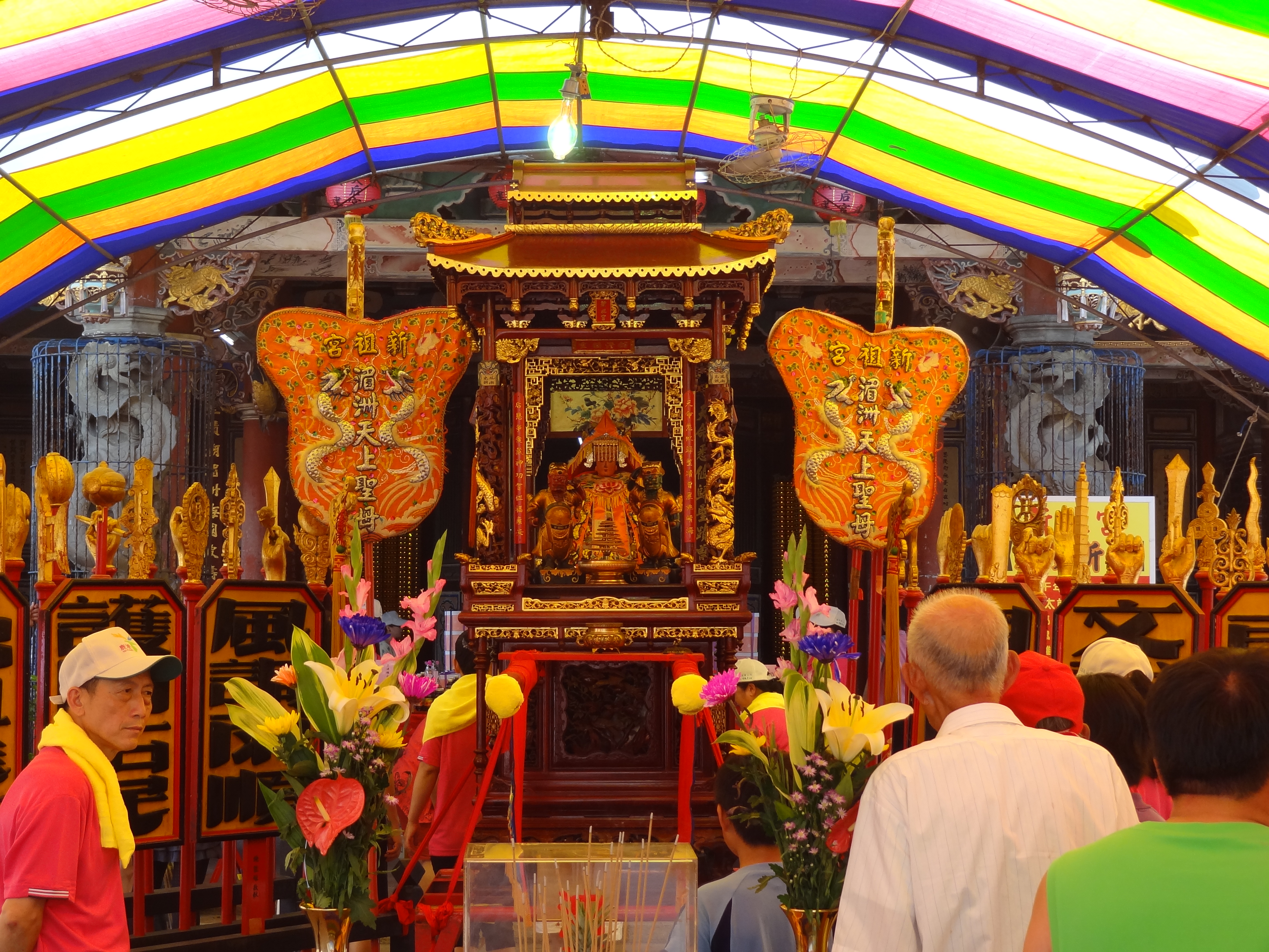 鹿港新祖宮「慶端陽活動」